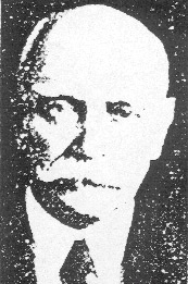 Dr Francis Xavier Dercum (1856-1931)